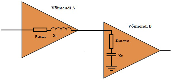 Võimendite A ja B sobitamine. Tehtud TinaSpice'i abiga.